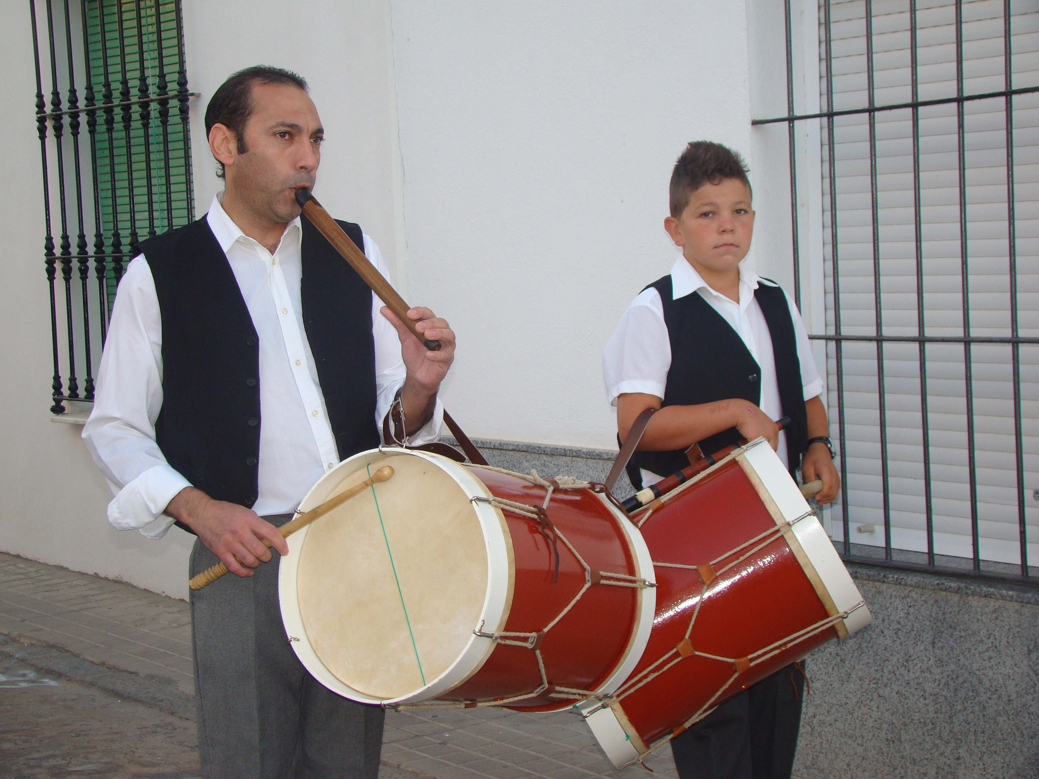 tambolirero